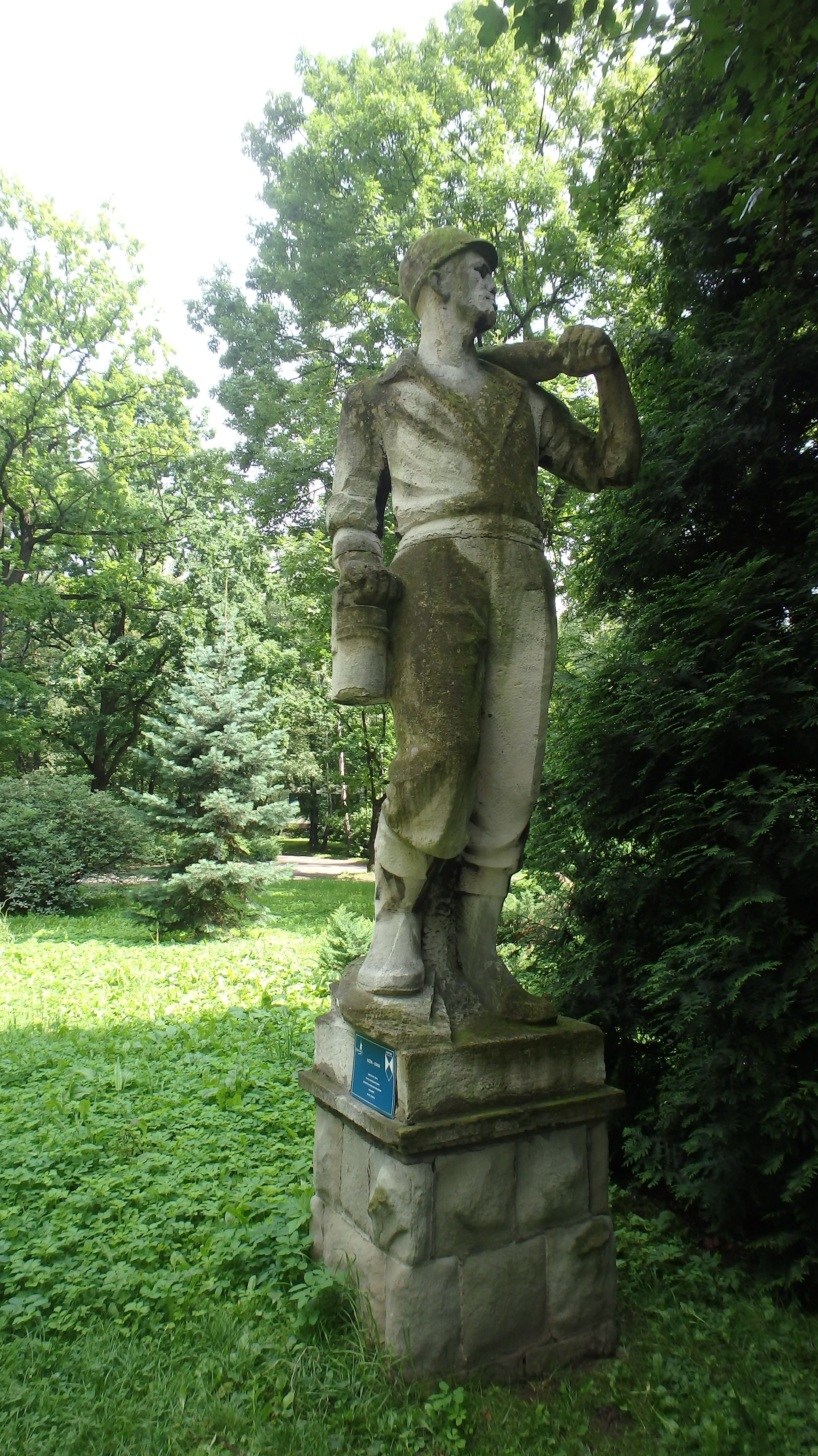 rzeźba plenerowa w Parku Śląskim, Chorzów